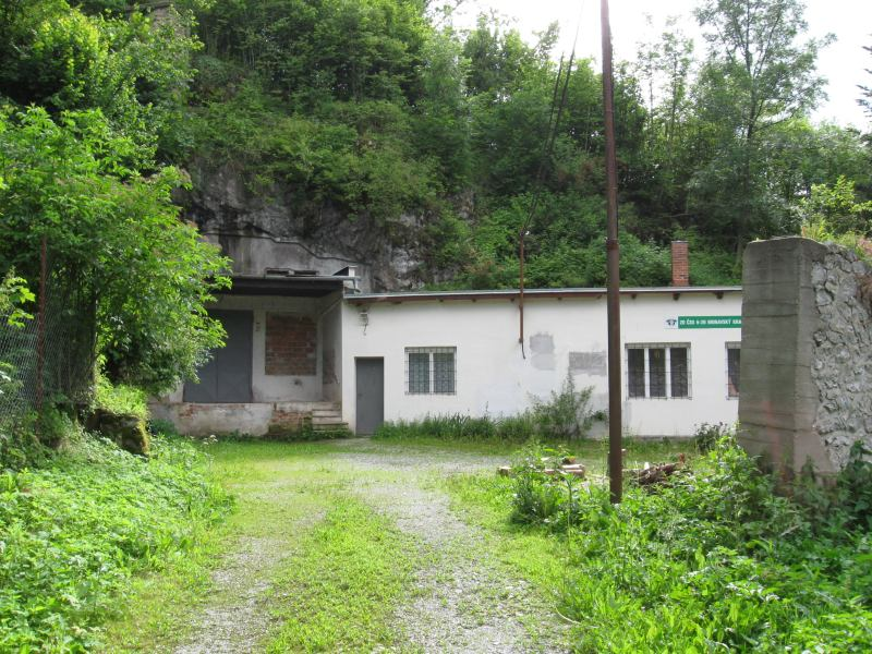 Jeskyně Michálka - vstup